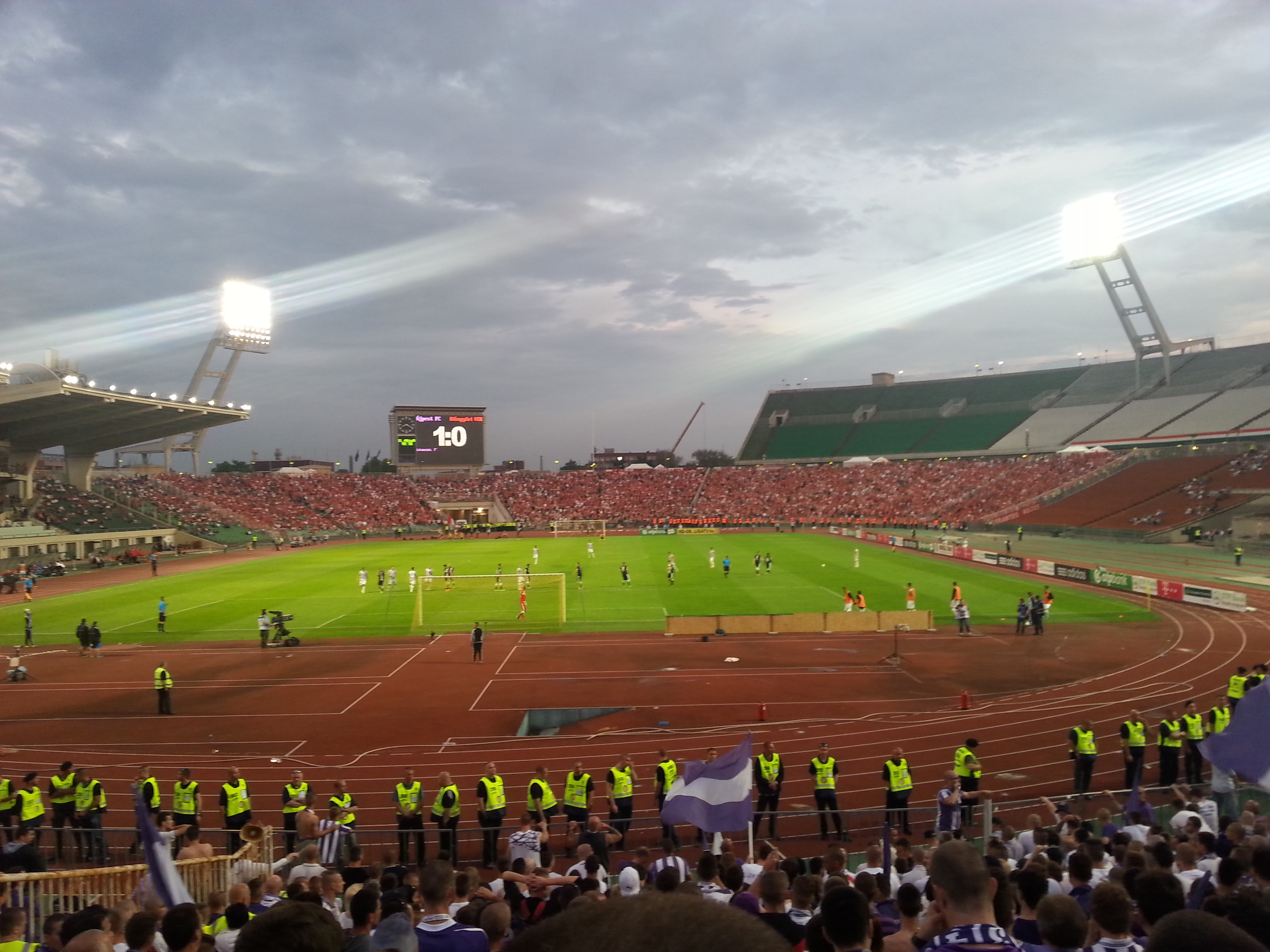 Magyar Kupa döntő1 2014.05.25 Újpest